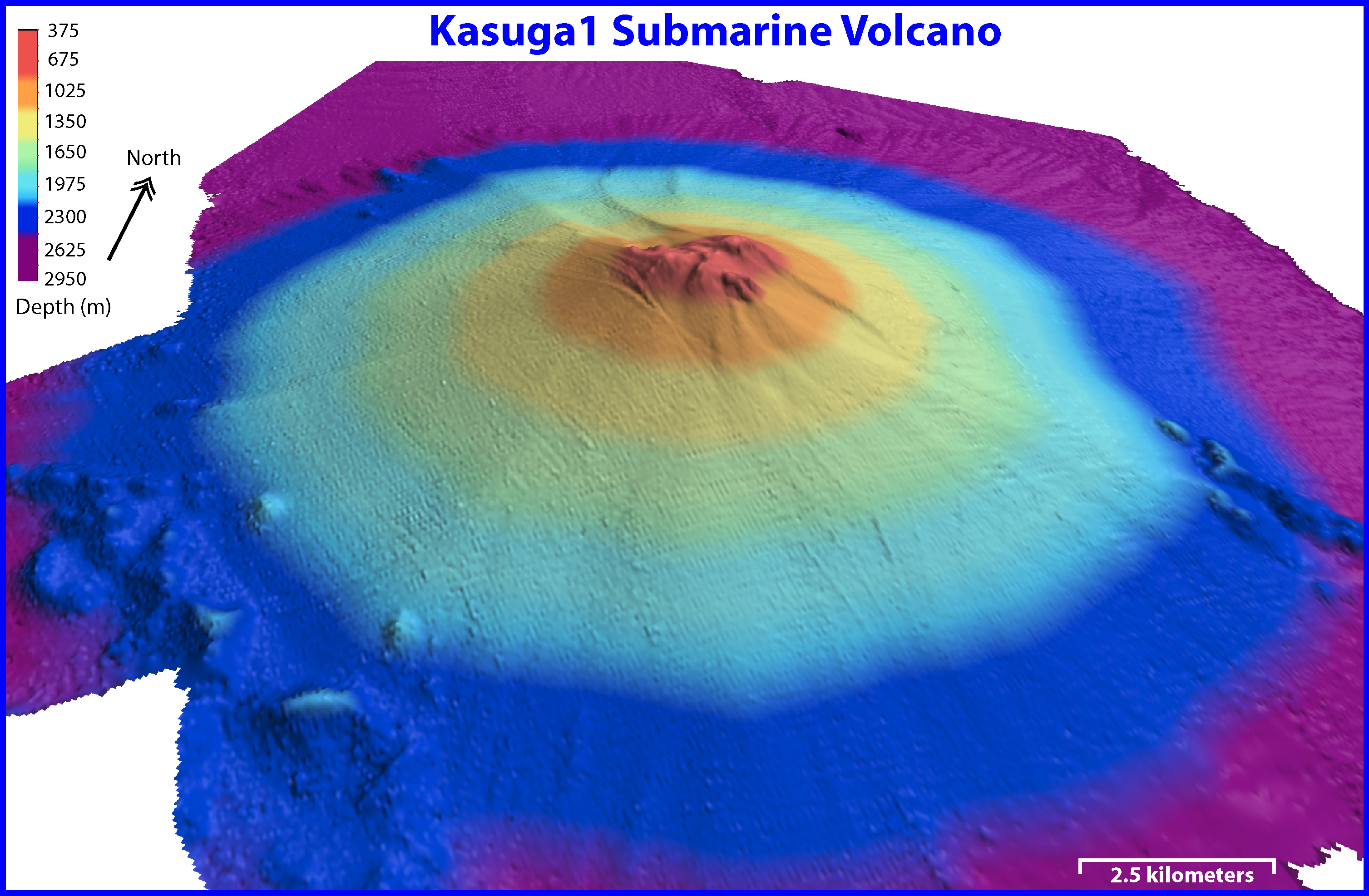 Kasuga volcano.